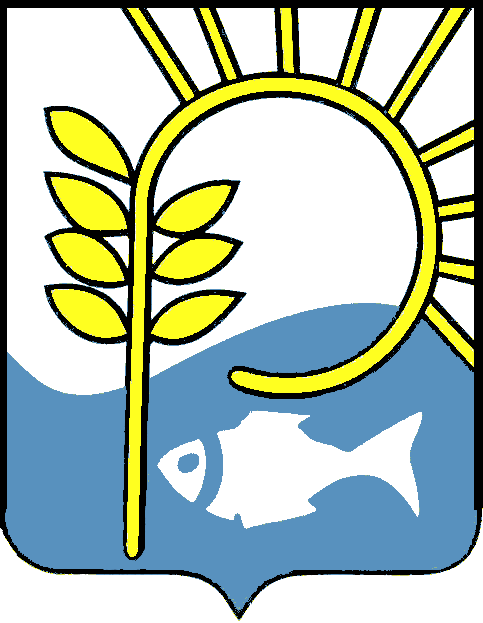 Herb Roztropic w powiecie bielskim, gminie Jasienica